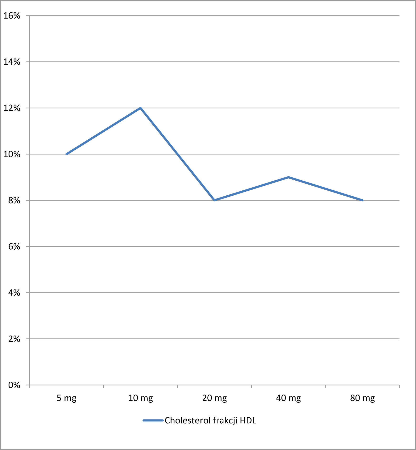 Wpływ simwastatyny na wskaźniki lipidowe (dane do wykresu za Maciej Banach, Jacek Rysz, Krzysztof J. Filipiak: Simwastatyna. Gdańsk: Via Medica, 2009. ISBN 978-83-7599-118-5. strona 17)